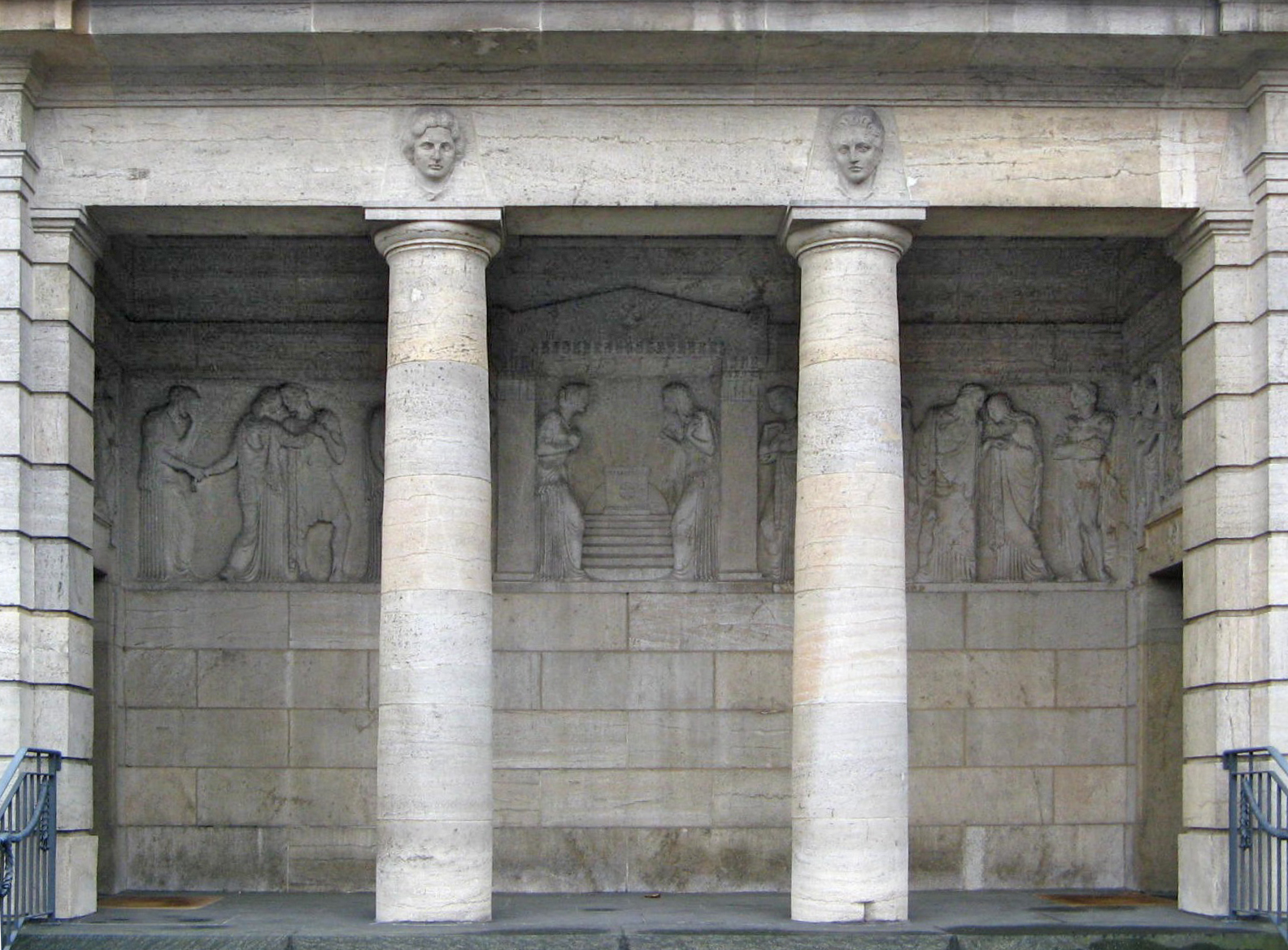 Südfriedhof Wiesbaden, Deutschland; äußerer nördlicher Portikus des Krematoriums (erbaut 1908/09). Das Relief im Fries (von Carl Wilhelm Bierbrauer) zeigt einen zur Mitte hin wallenden Trauerzug[1].